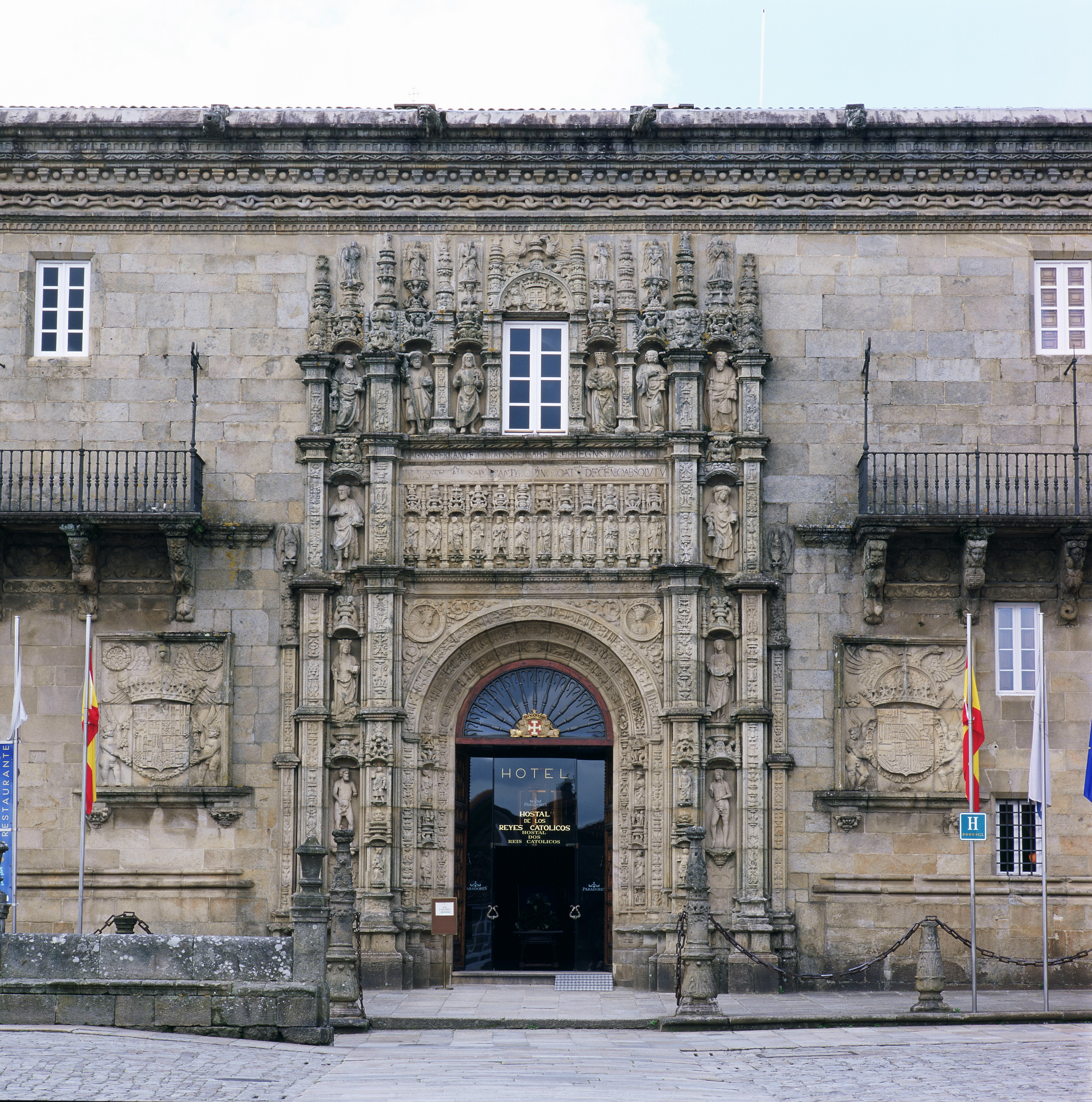 Parador de Santiago de Compostela